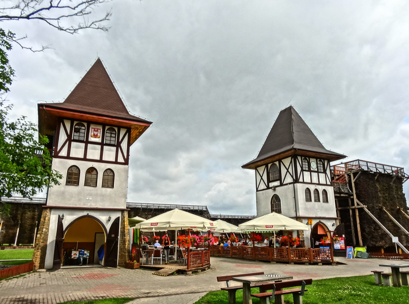 Park Solankowy w Inowrocławiu, tężnie